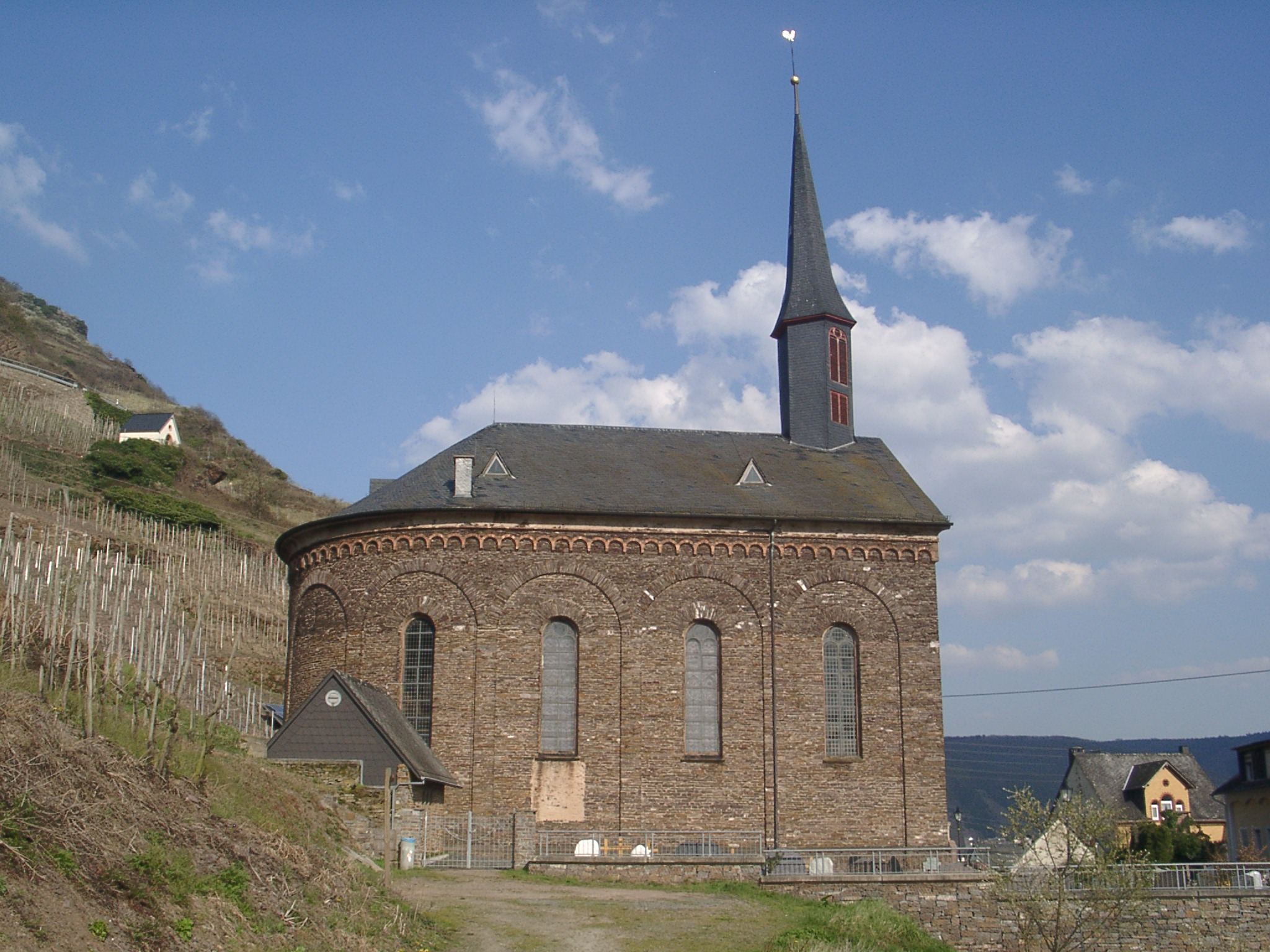 Valwig an der Mosel, Pfarrkirche St. Martin; architect Johann Claudius von Lassaulx